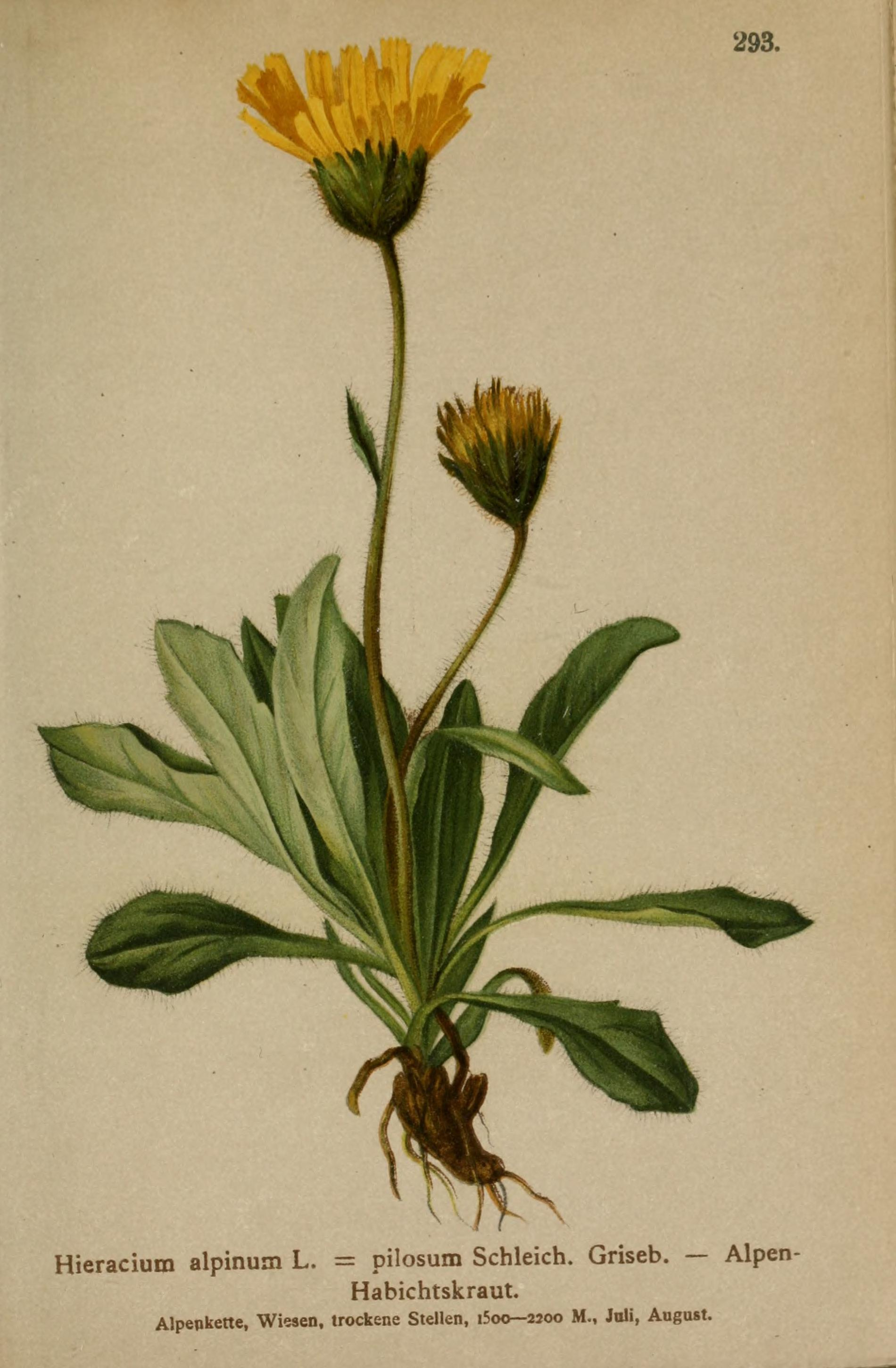 Atlas der Alpenflora / herausgegeben vom Deutschen und Oesterreichischen Alpenverein ; nach der Natur gemalt von Anton Hartinger ; mit Text von K.W. v. Dalla Torre.